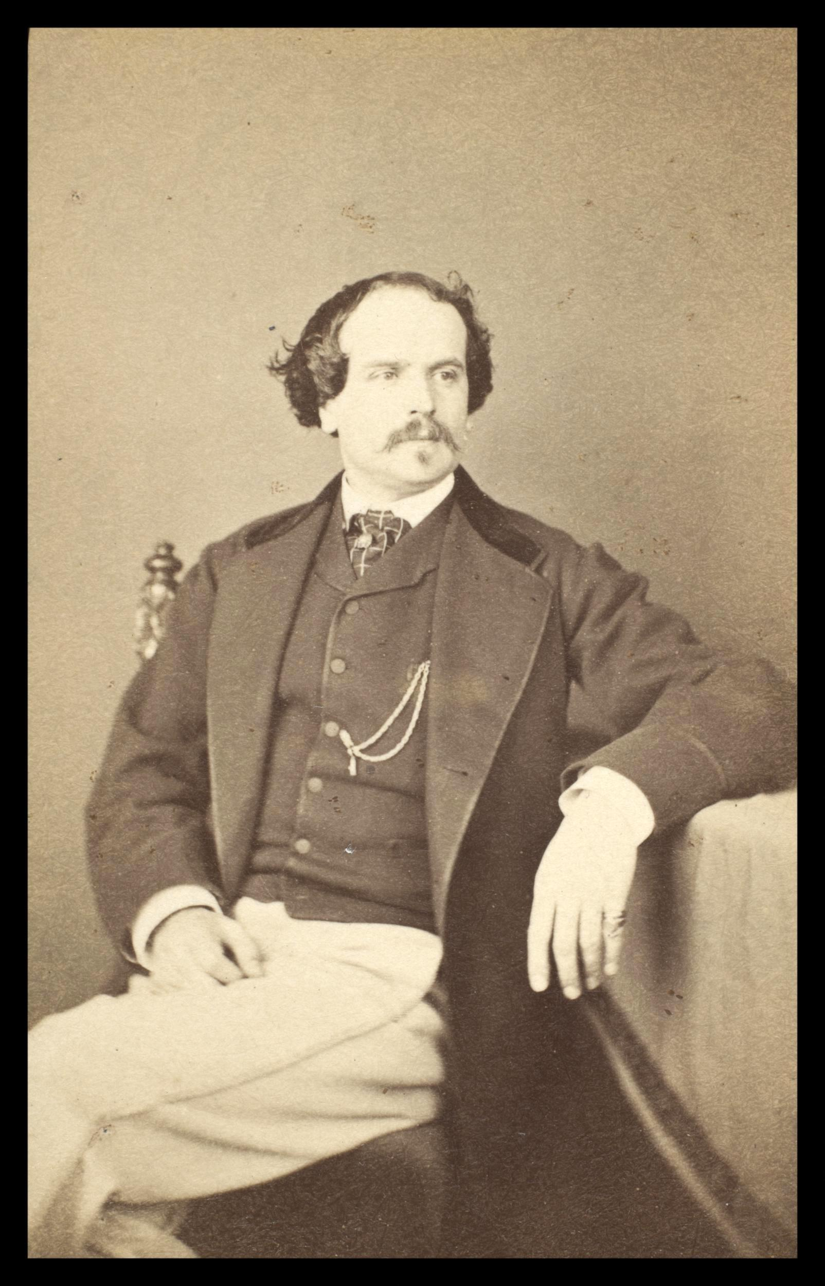 Photograph by Henry Hering